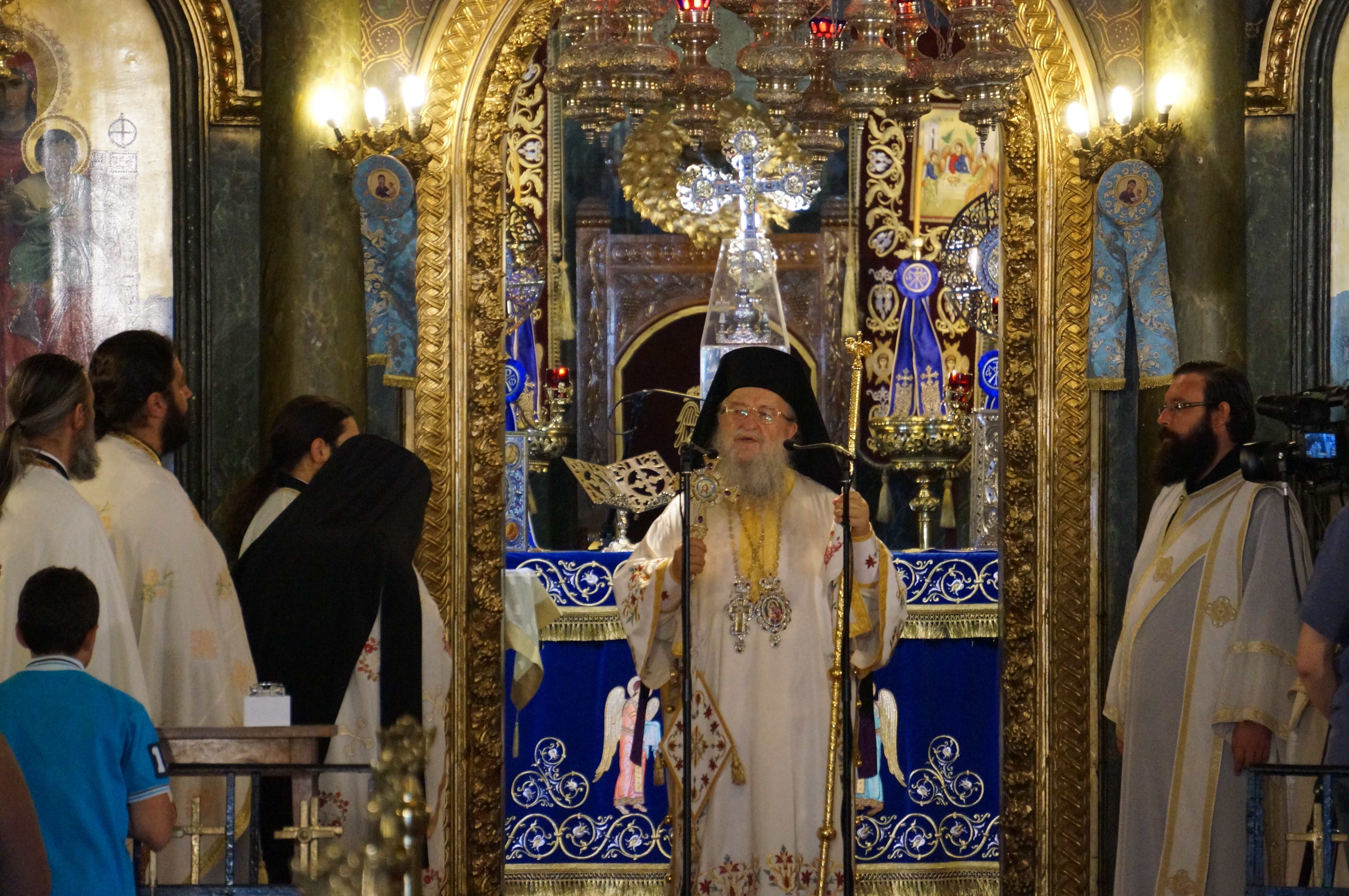 à sainte Sophie.